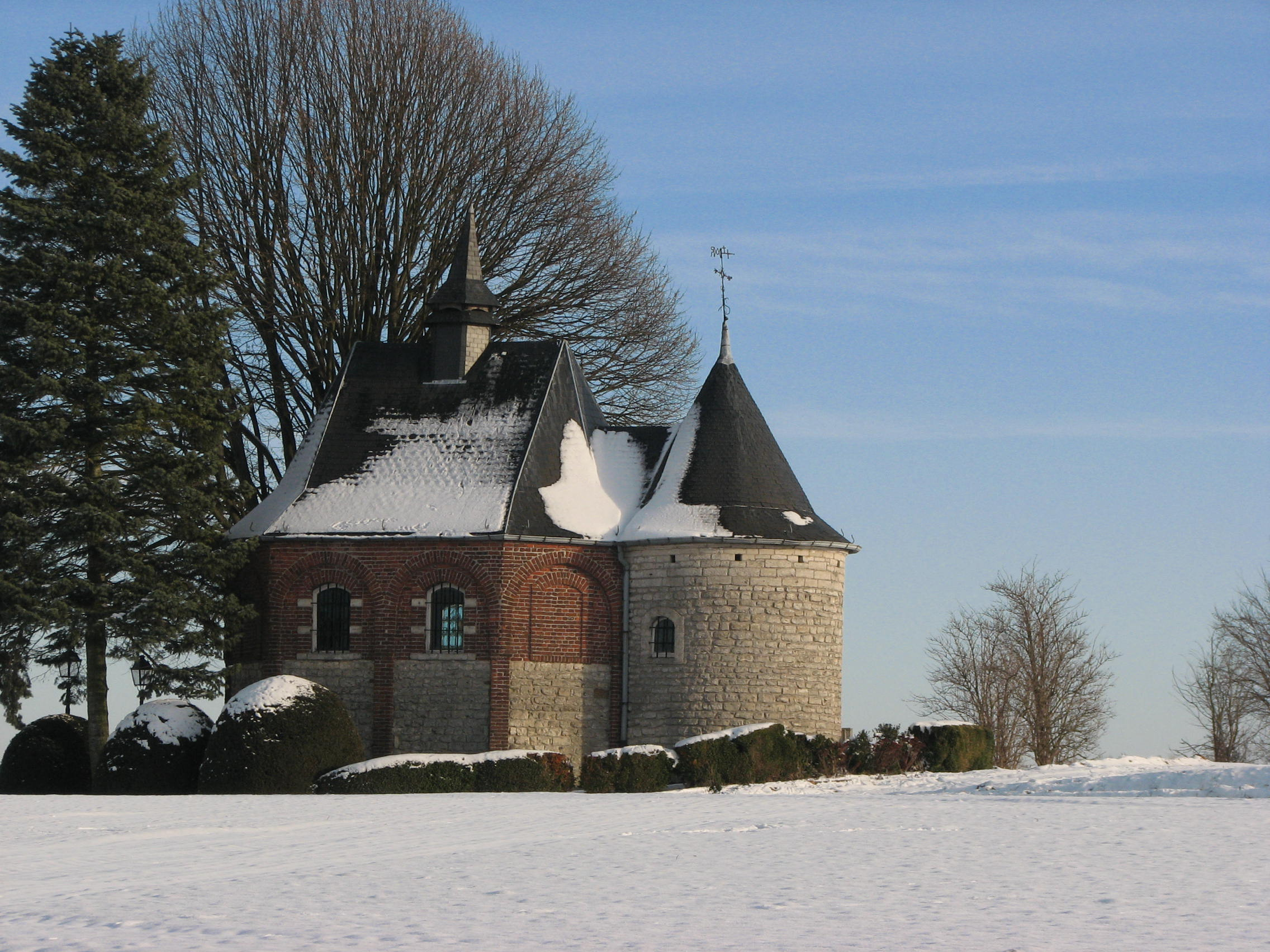 Chapelle Notre-Dame de Bon-Secours à Zetrud-Lumay (route Jodoigne-Tienen).